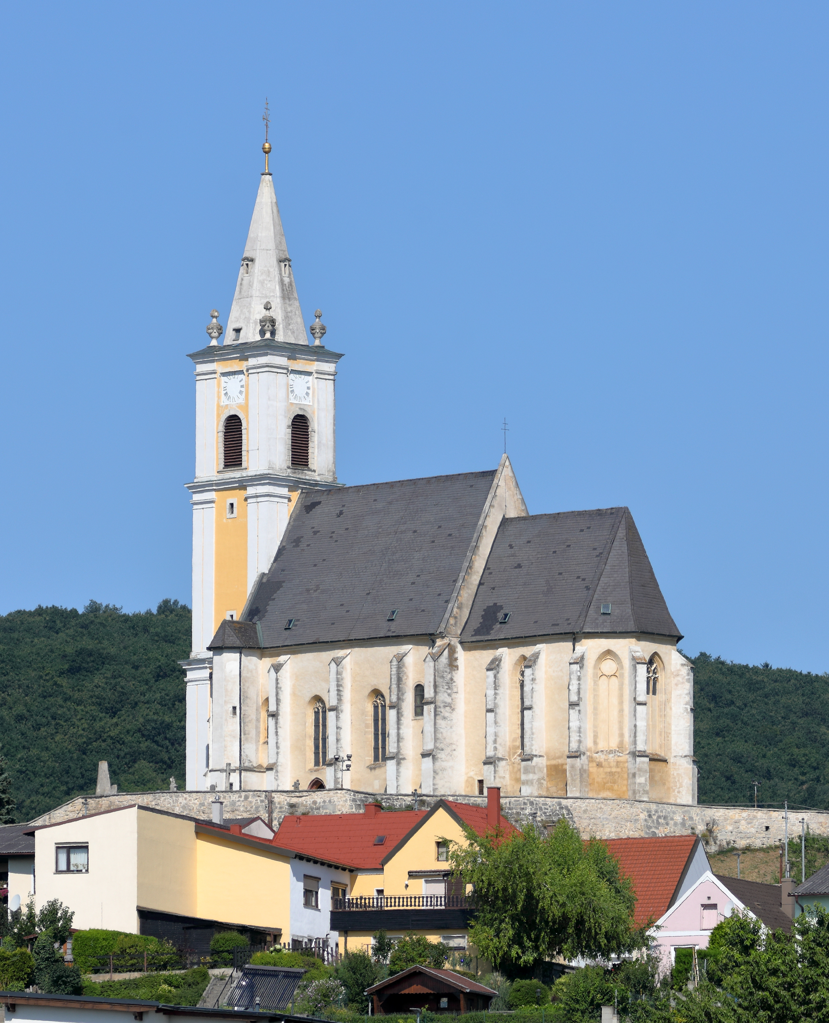 Südostansicht der röm.-kath. Pfarrkirche hl. Veit in Kleinhöflein, ein Ortsteil der burgenländischen Landeshauptstadt Eisenstadt.Die Kirche wurde auf einer Anhöhe errichtet, wobei der Chorraum aus dem 15. Jahrhundert stammt und das spätgotische Schiff 1528 angebaut wurde. Die Errichtung des dreigeschossigen Westturmes mit steinernem Spitzhelm erfolgte 1700.